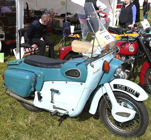 Panasonic G1 14-45 Lens